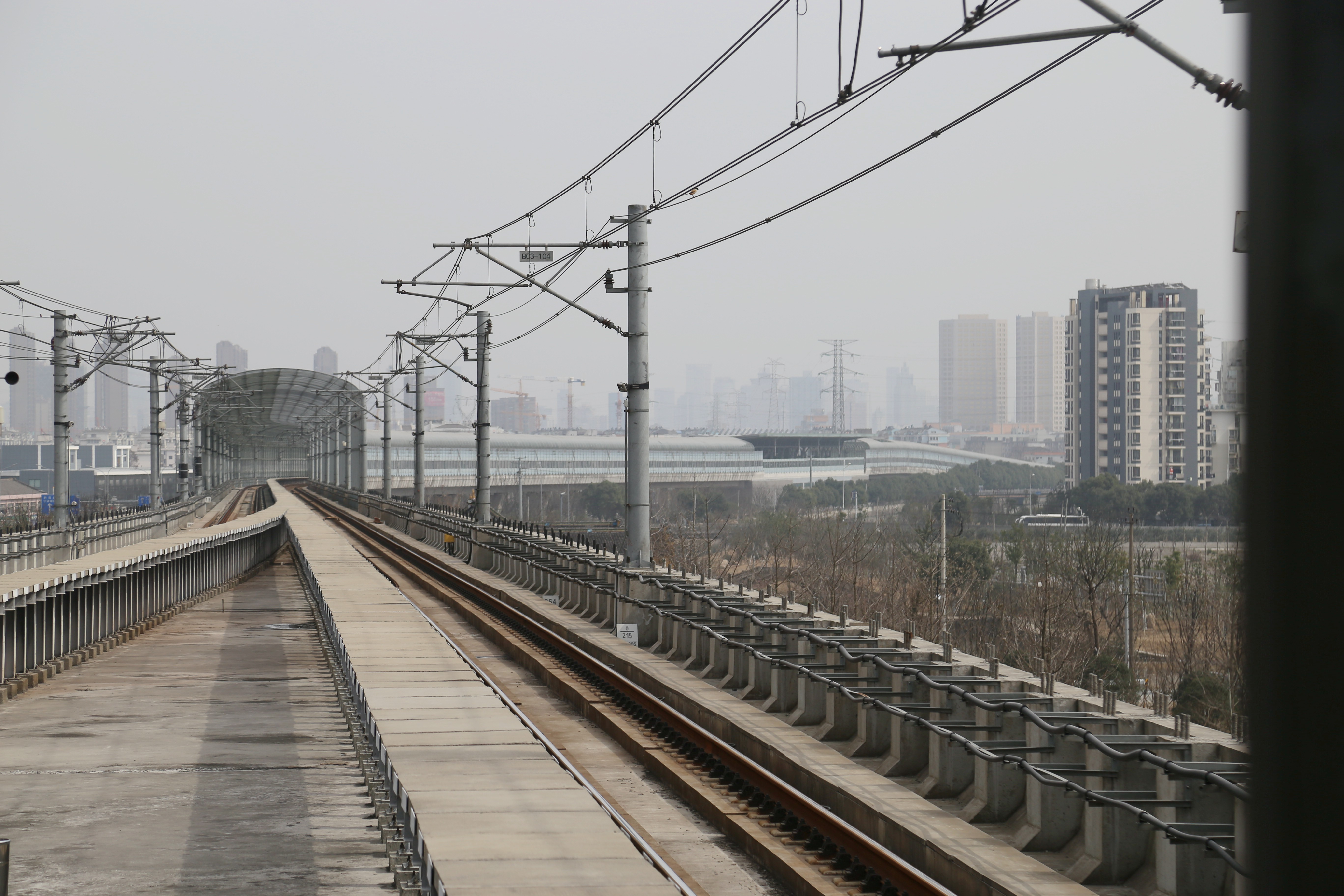 芦港站下行端头远眺，远处为徐家漕长乐站